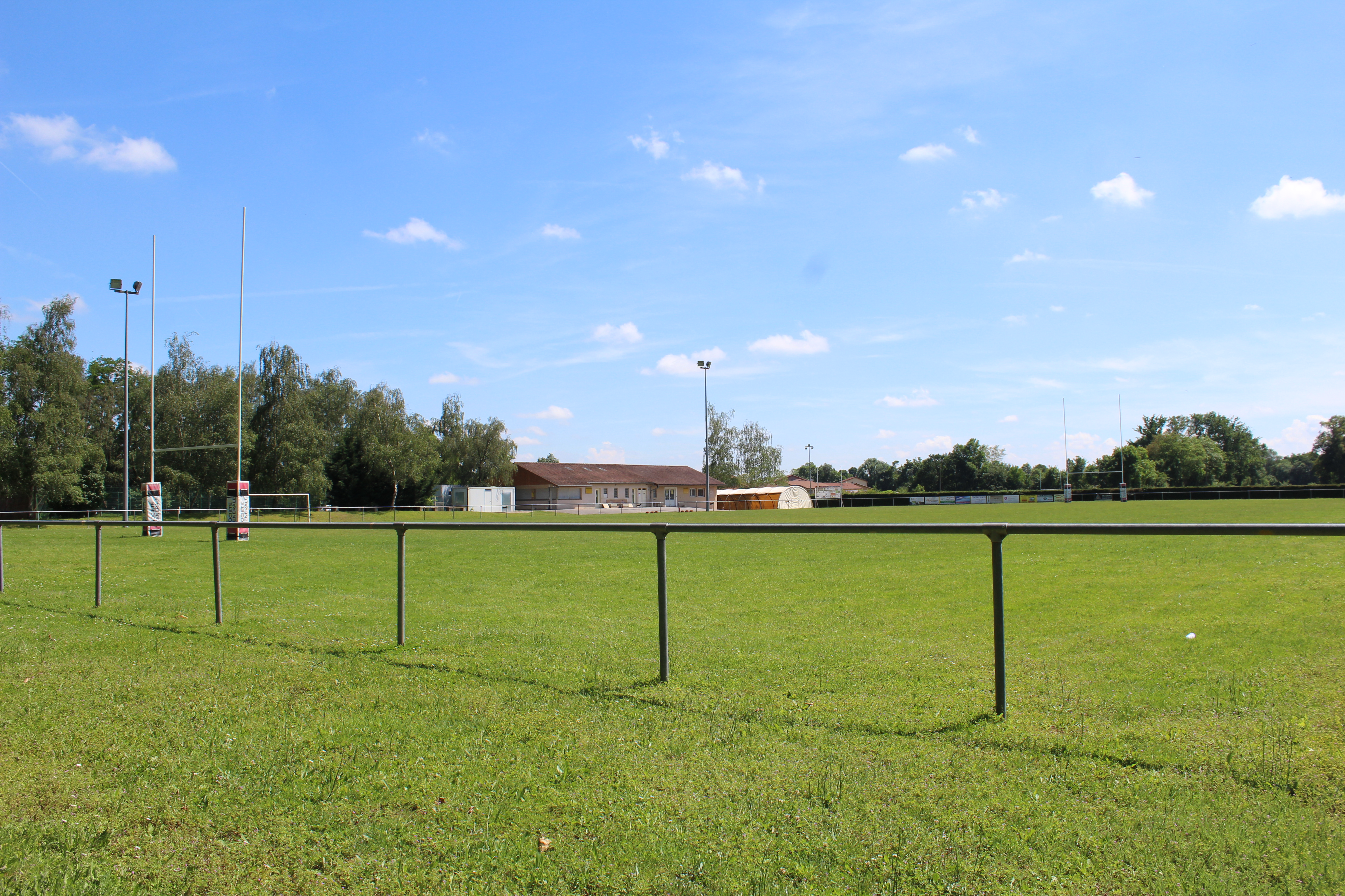 Stade de rugby Lucien Morel à Pont-de-Veyle.